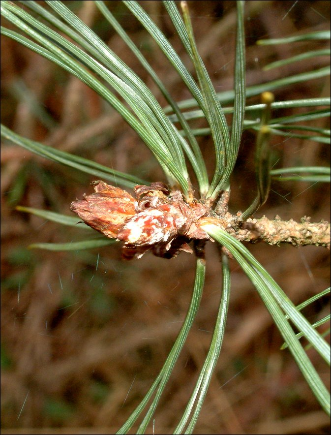 Fir-, pine- and spruce-needle in comparison -- Tannen-, Kiefern- und Fichtennadeln im Vergleich. This image: pineneedle / Kiefernnadel